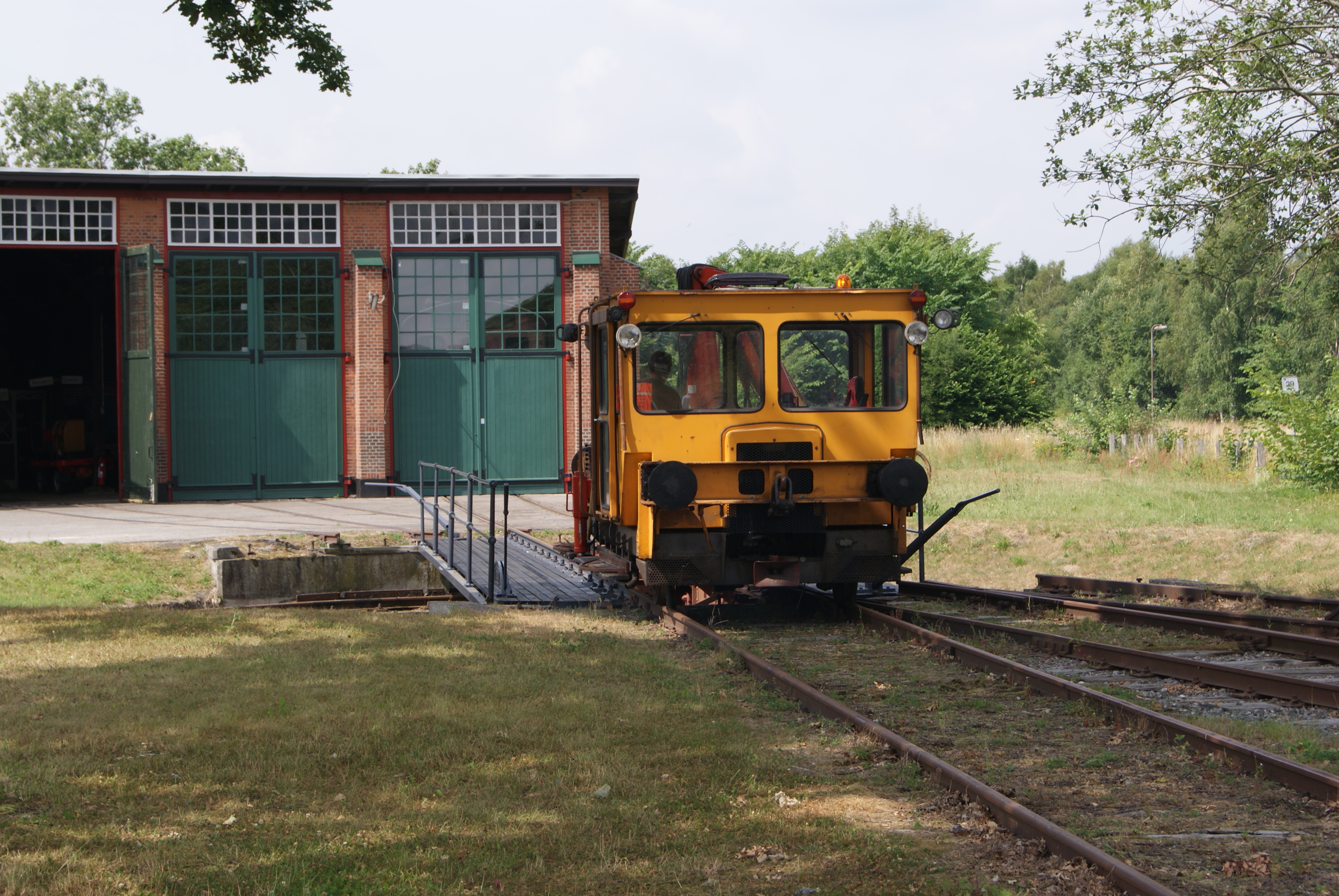 x